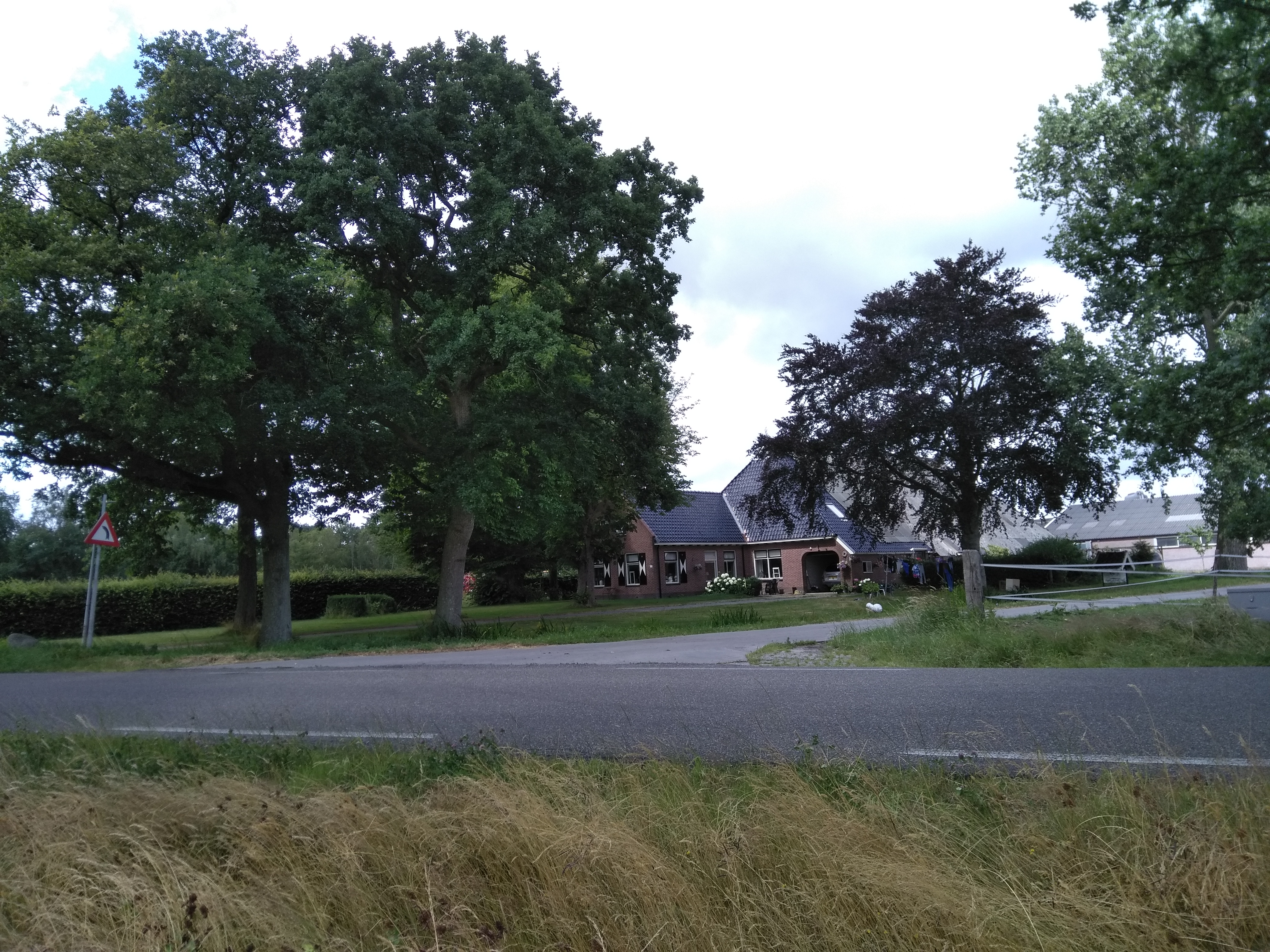 De boerderij 'Het Voorwerk' in Siegerswoude, gemeente Opsterland, Friesland.